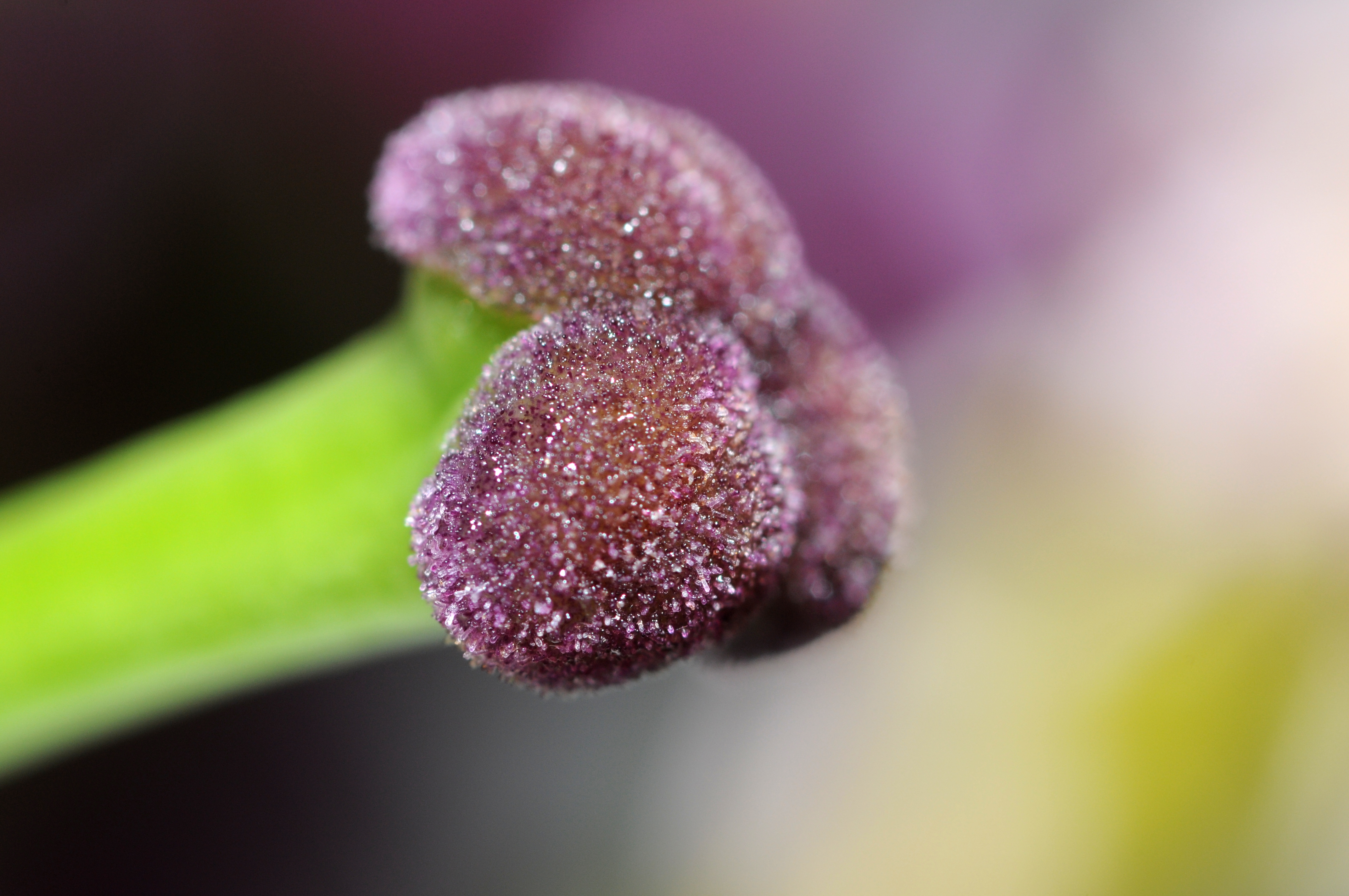 Pistil